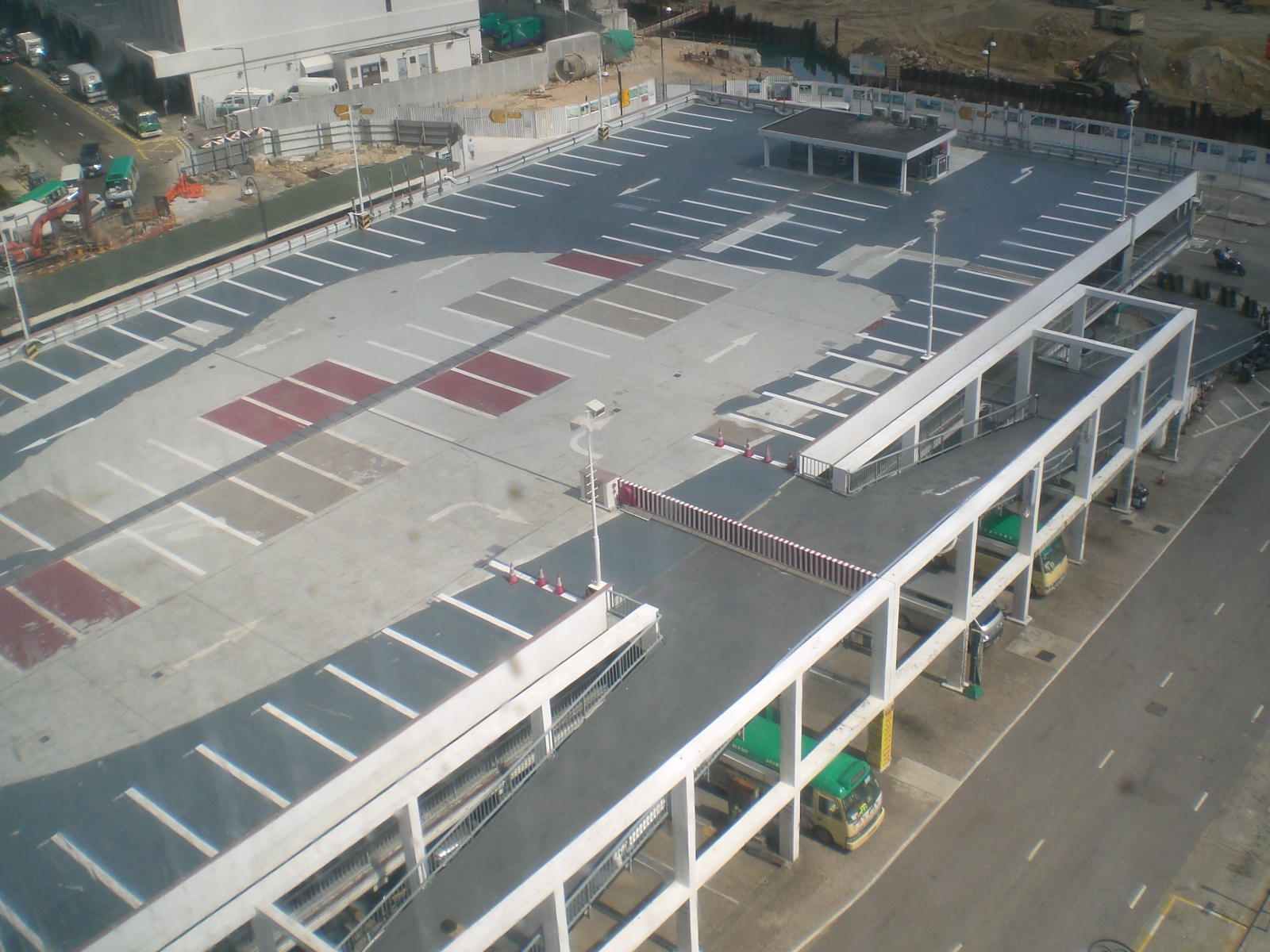 中環香港大會堂(高座)景觀zh:愛丁堡廣場、天星碼頭多層停車場等